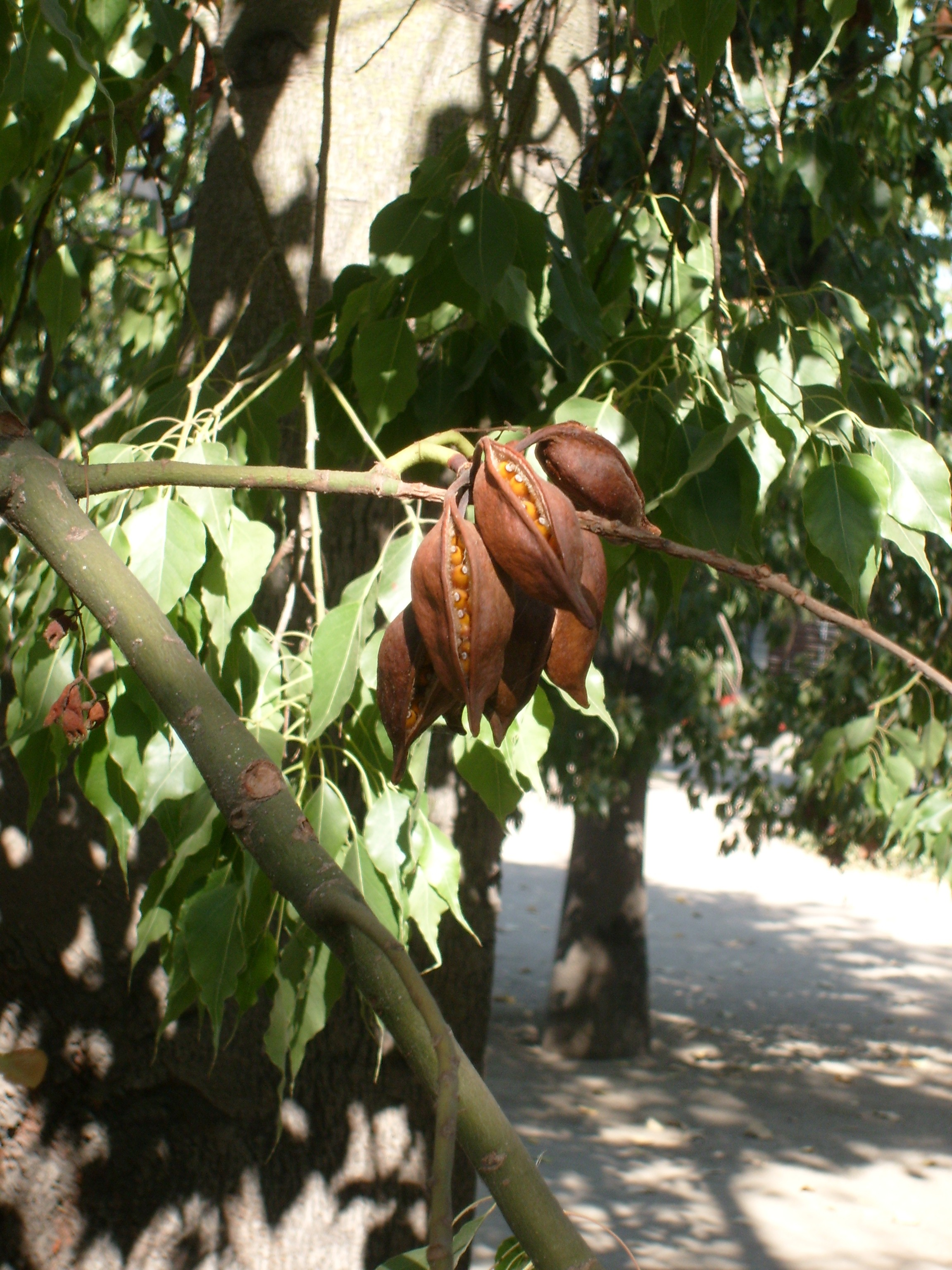 Brachychiton populneus, folículo abierto